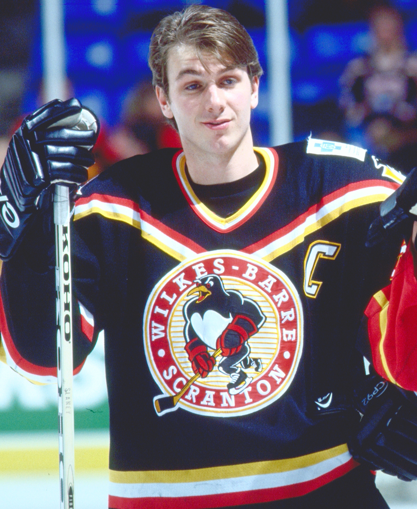 ahlstar0241